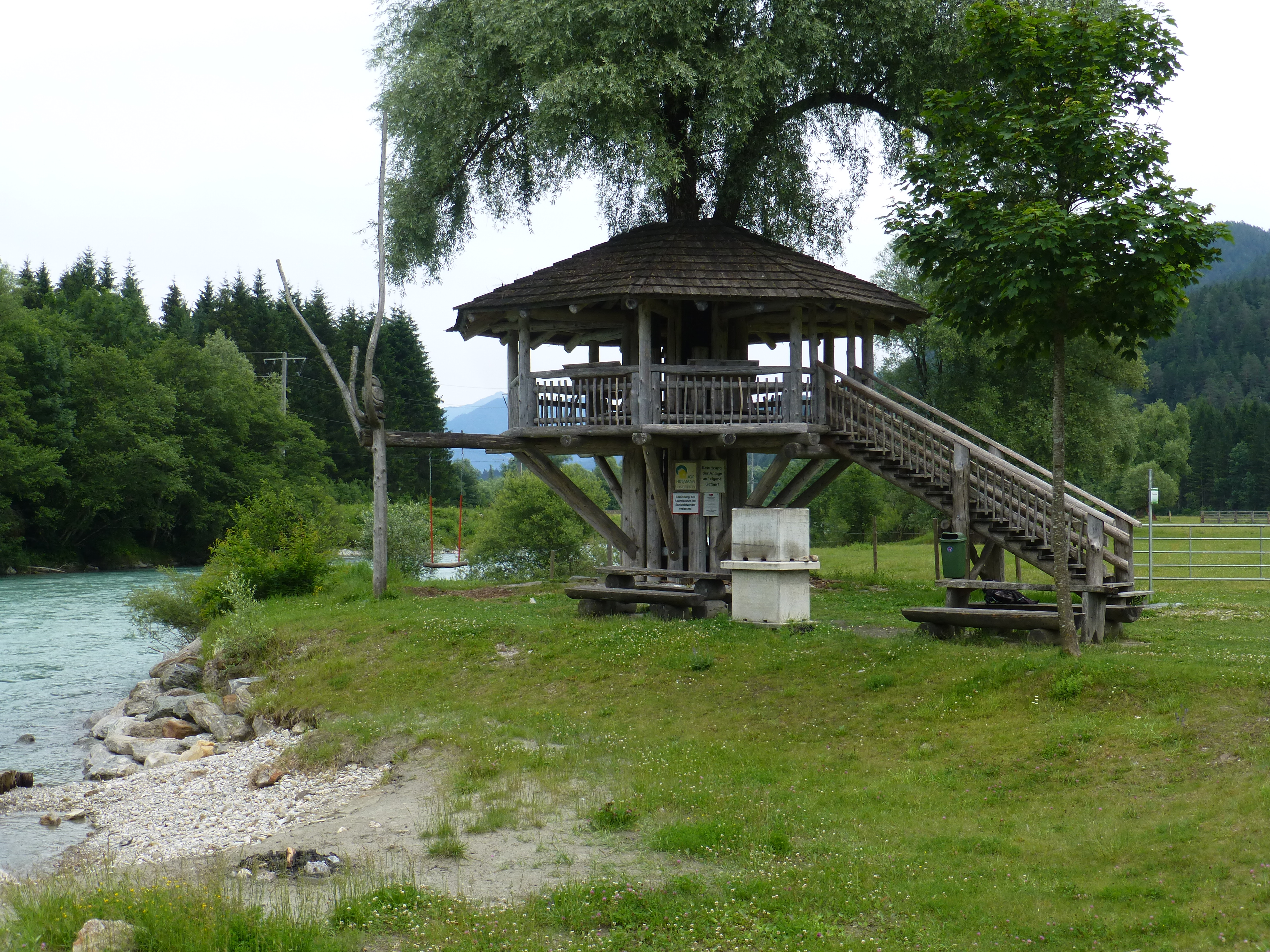 Die Drau Oase in Dellach, Aussichtsplattform DrAUENland